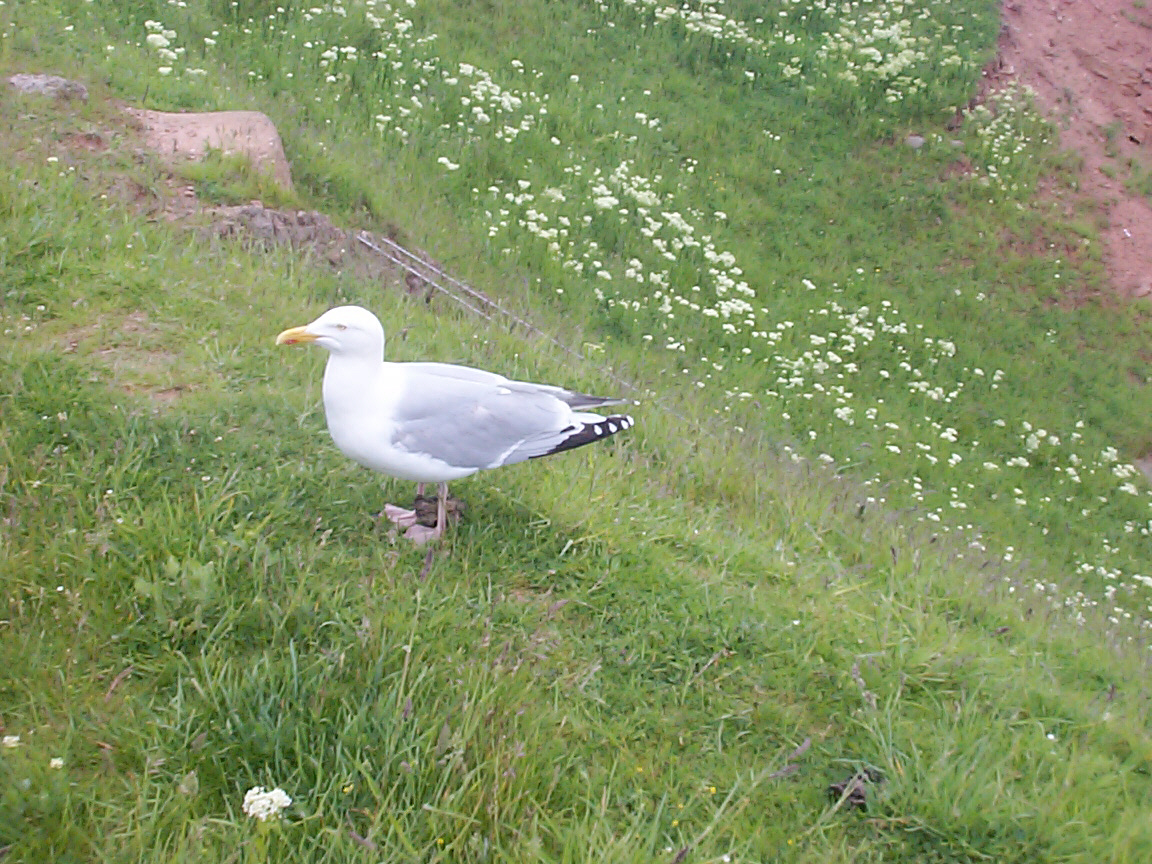 Silbermöwe (Larus argentatus) auf Helgoland